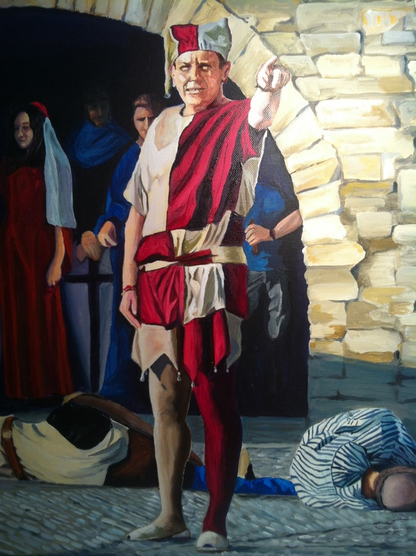 Oleo sobre lienzo, 2015